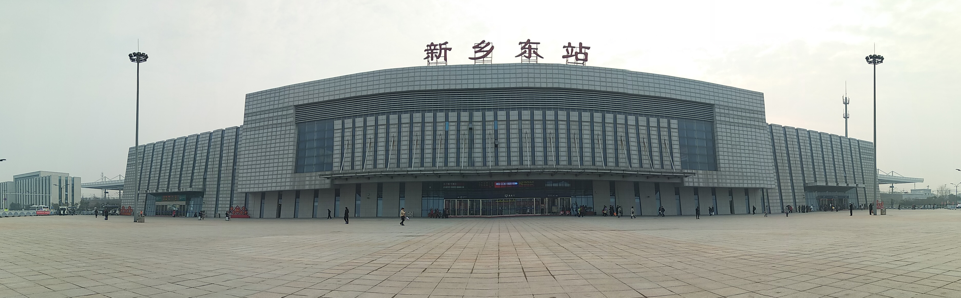 京广高铁新乡东站全景